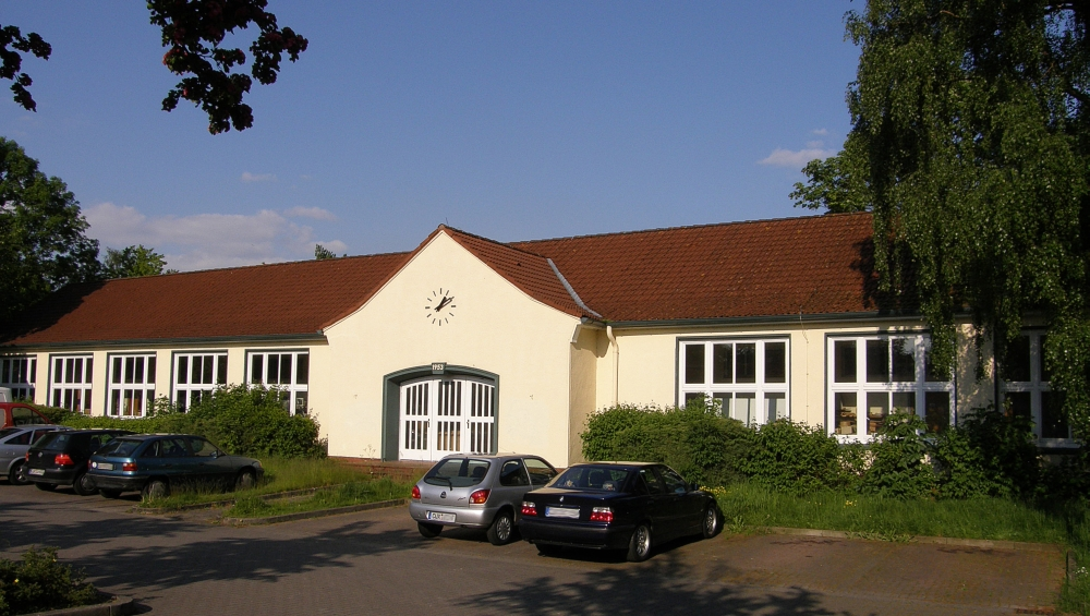 Hauptschule in Otterndorf